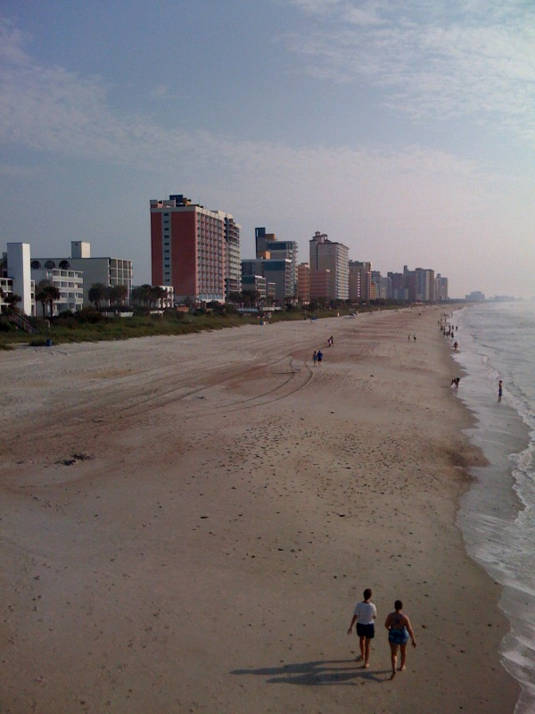 Phil